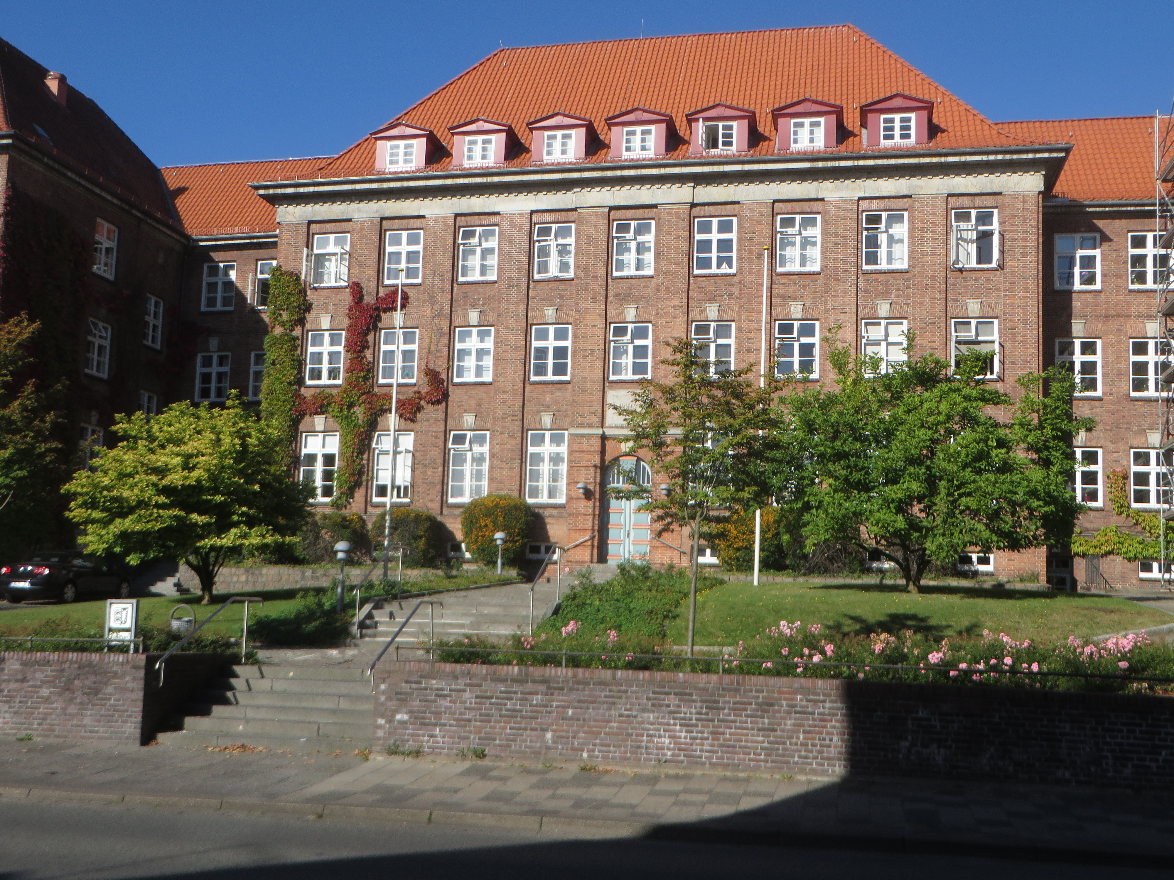 Finanzamt Flensburg (September 2016), Bild 01